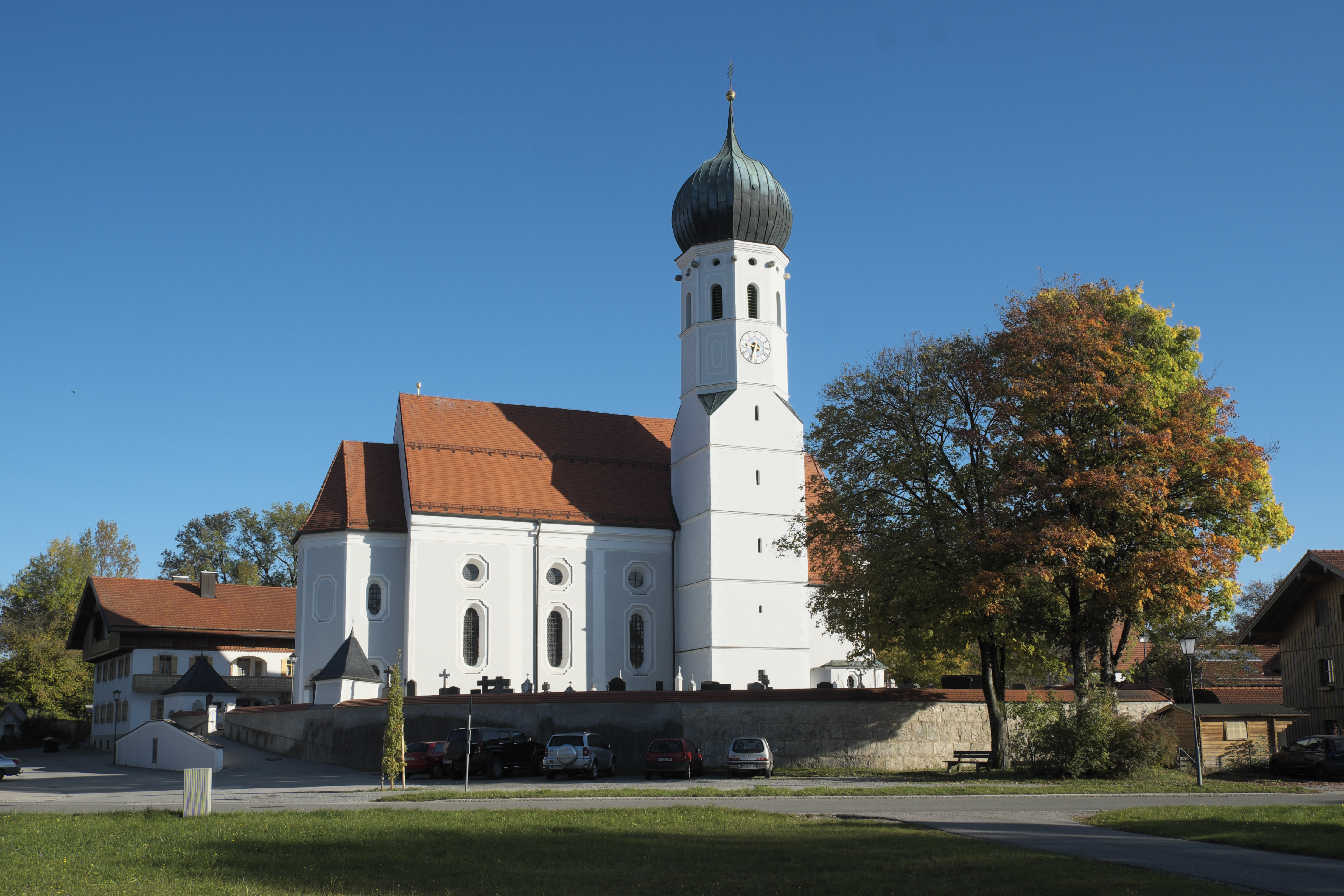 Katholische Pfarrkirche St. Emmeram in Kleinhelfendorf (Aying) im Landkreis München (Bayern/Deutschland)